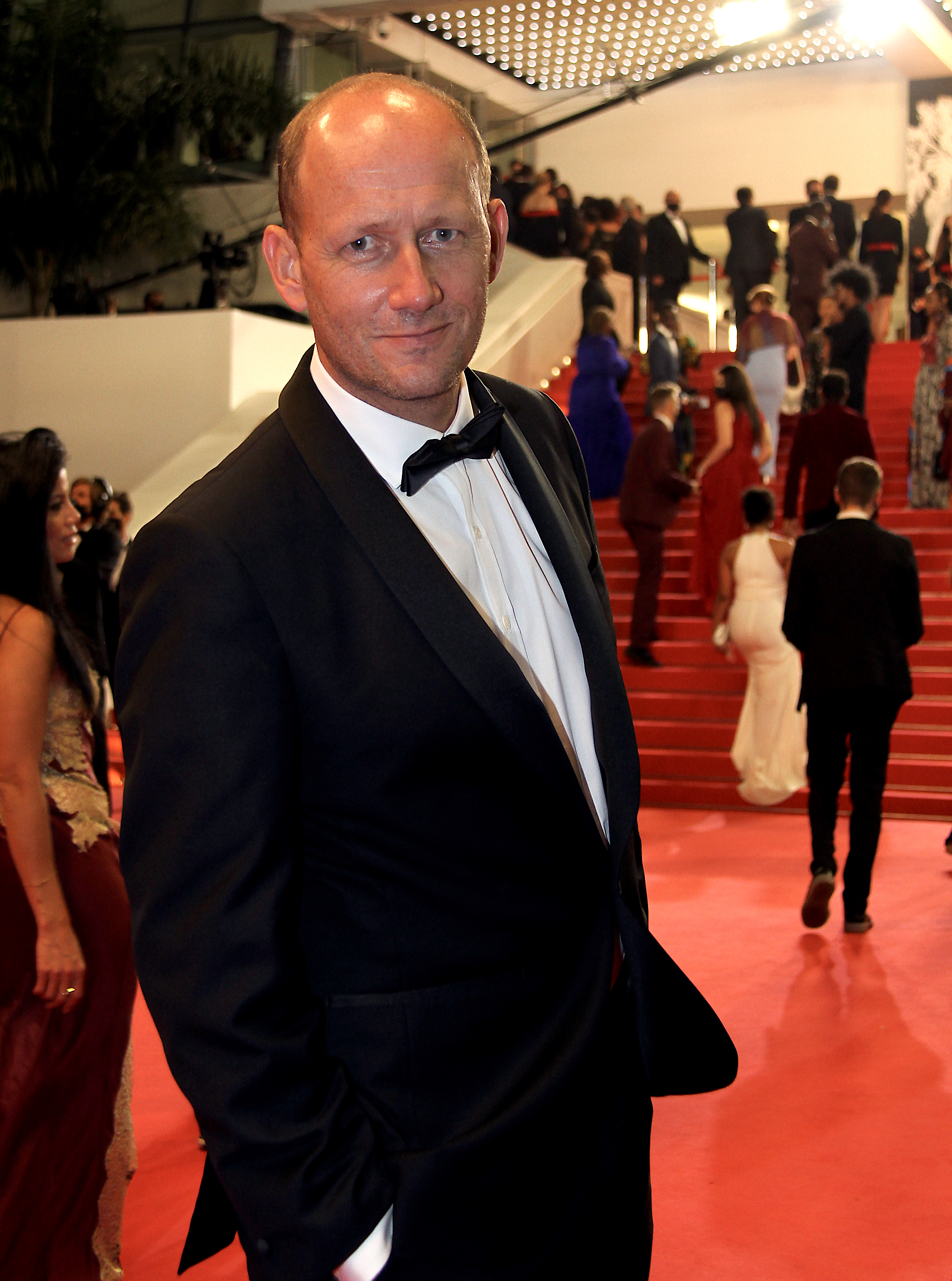 Xavier de Lauzanne, réalisateur de documentaires pour le cinéma